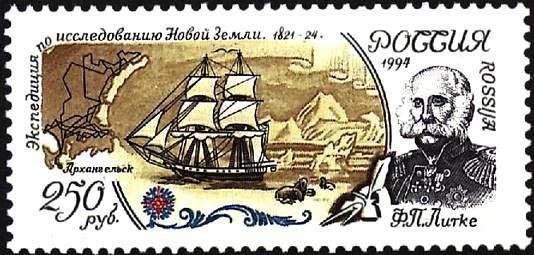 марка